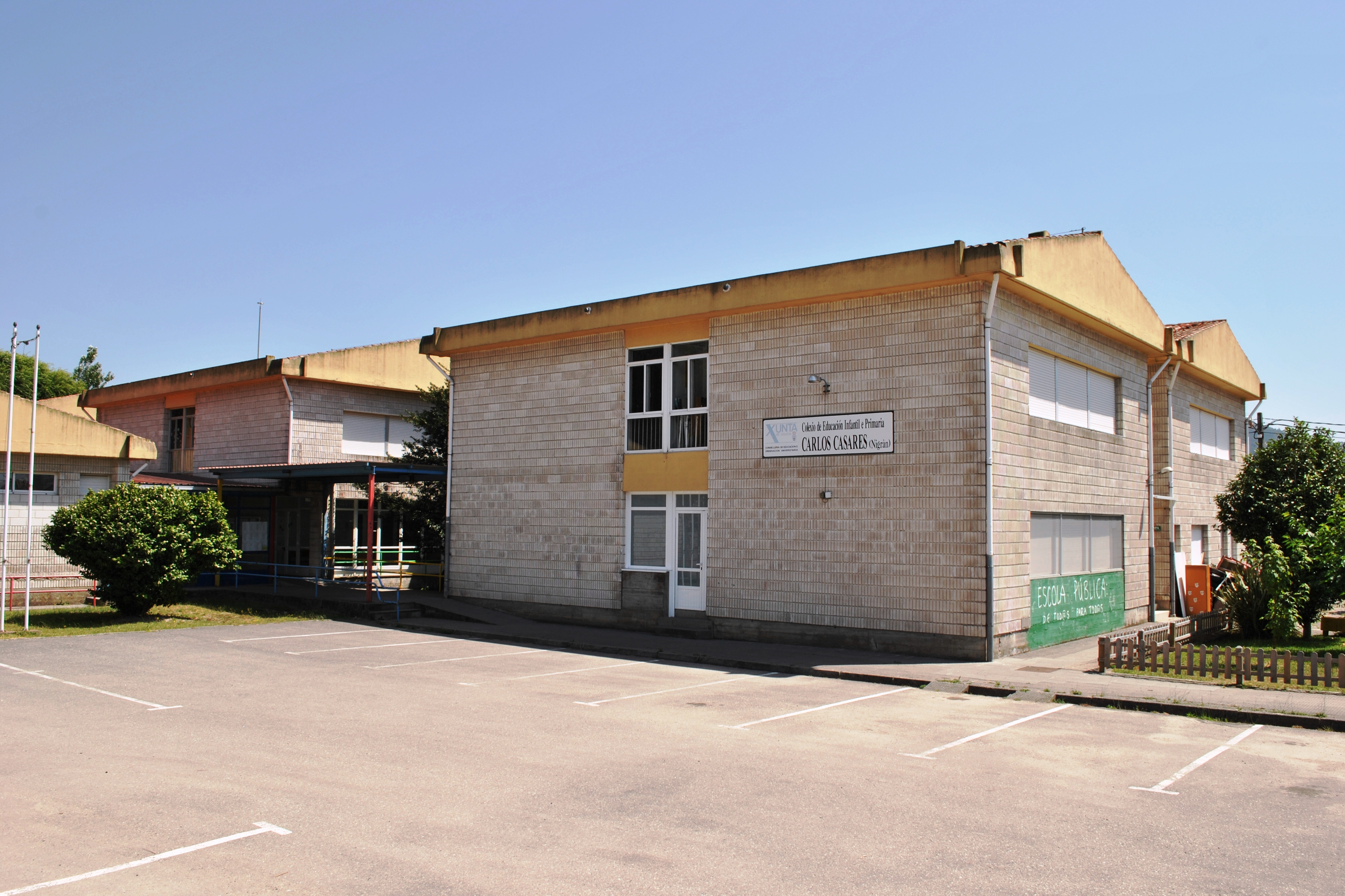 Véxase o título e as categorías